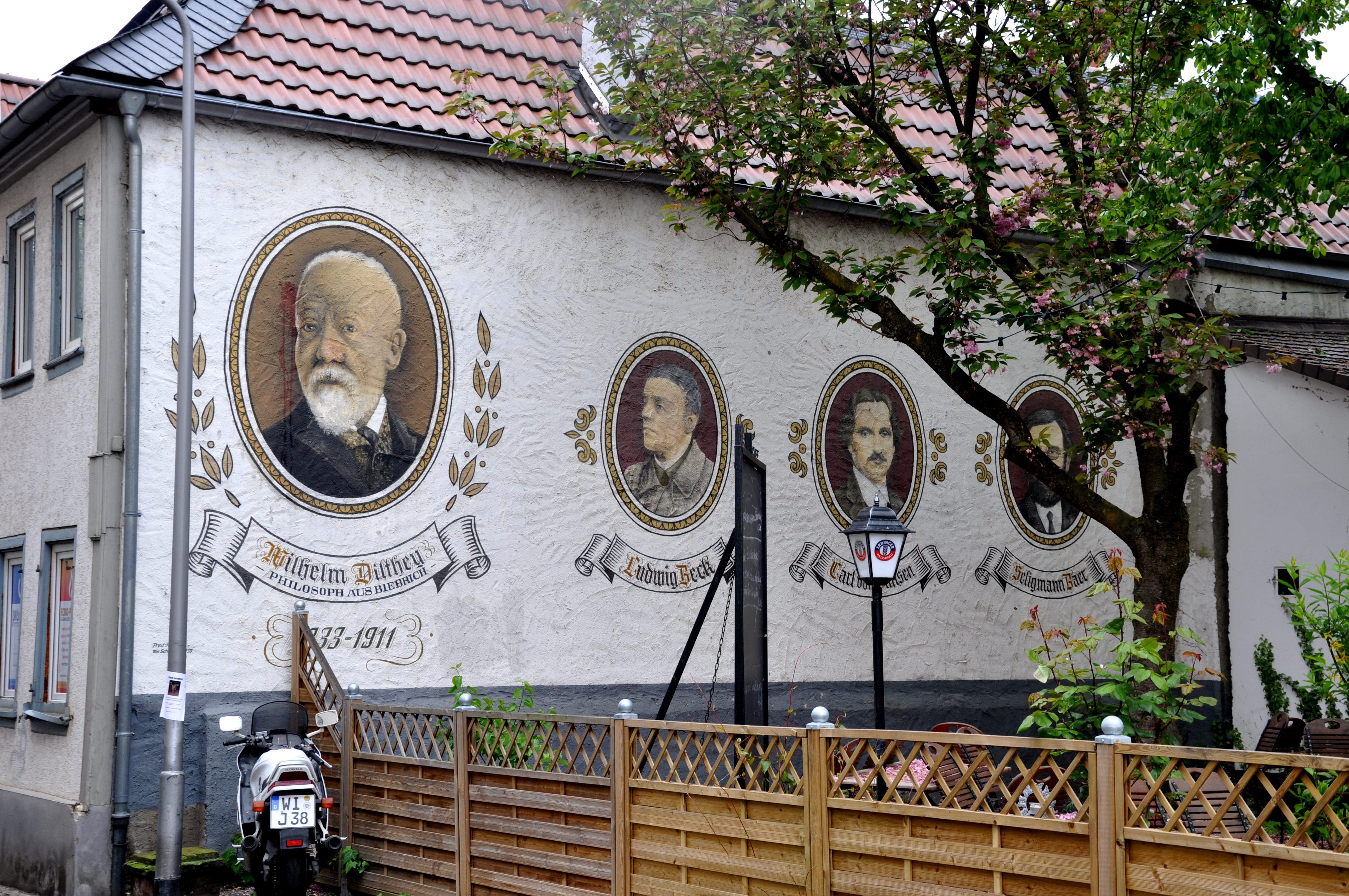 Wiesbaden-Biebrich, Wandmalereien im Biergarten gegenüber dem Dilthey-Haus (signiert: "Fred Hepp, Am Schlosspark 139")